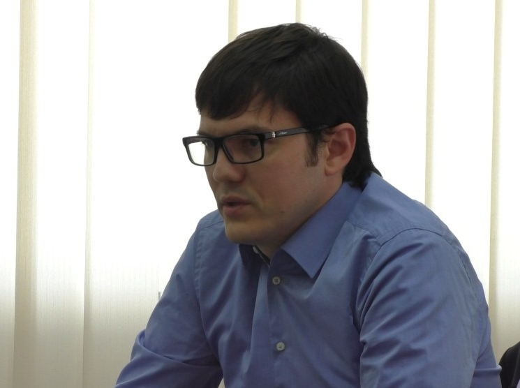 Колишній міністр інфраструктури України Андрій Пивоварський під час візиту у Маріуполь